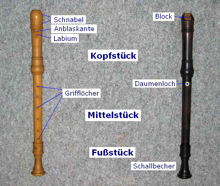 Aufbau einer Blockflöte Linkes Instrument: Alt-Blockflöte aus Maracaibo-Buchsbaum, Oberseite Rechtes Instrument: Baugleiches Instrument aus Ebenholz, Unterseite